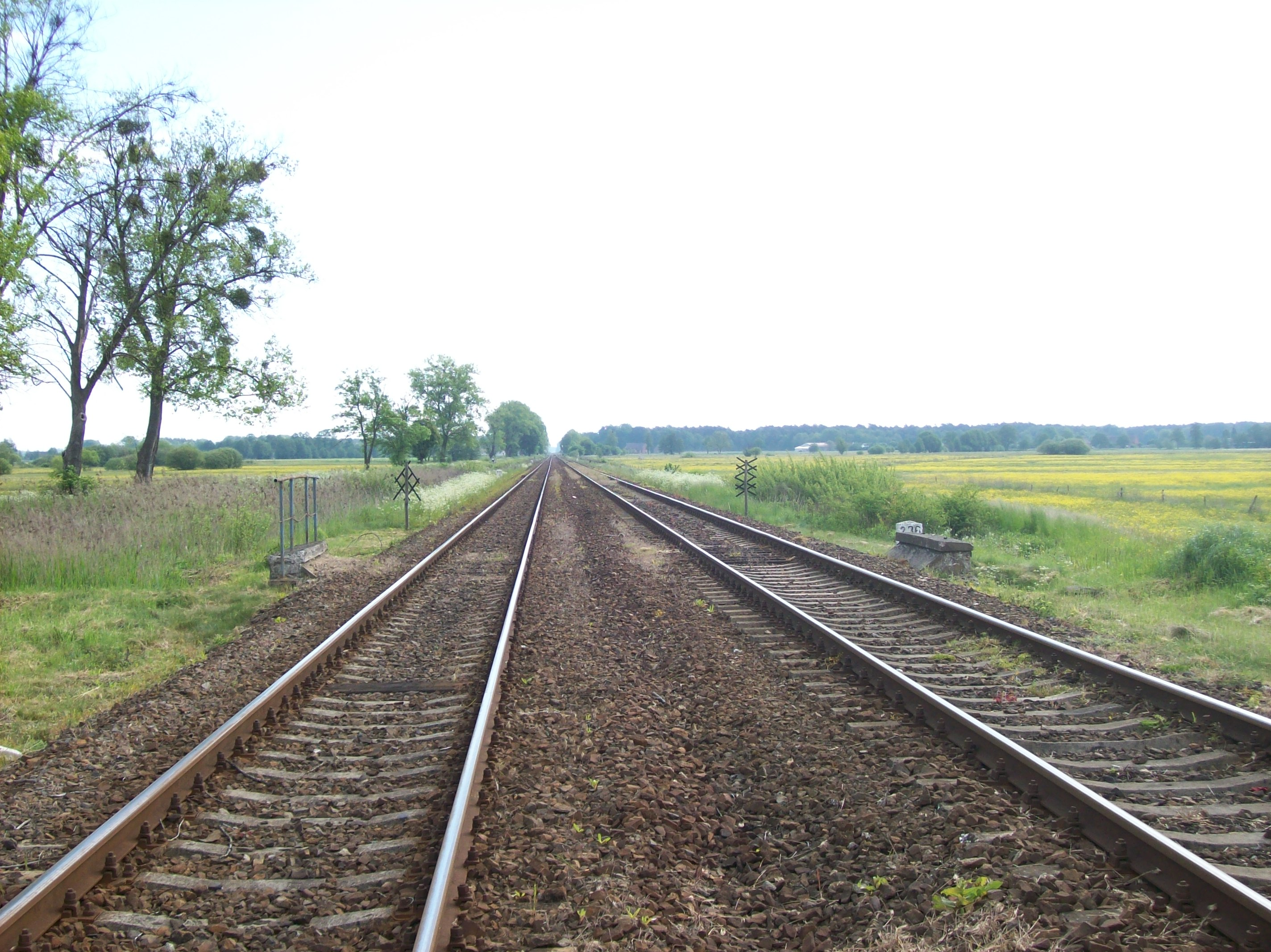 Linia kolejowa nr 203 (szlak Krzyż - Wieleń Płn.)